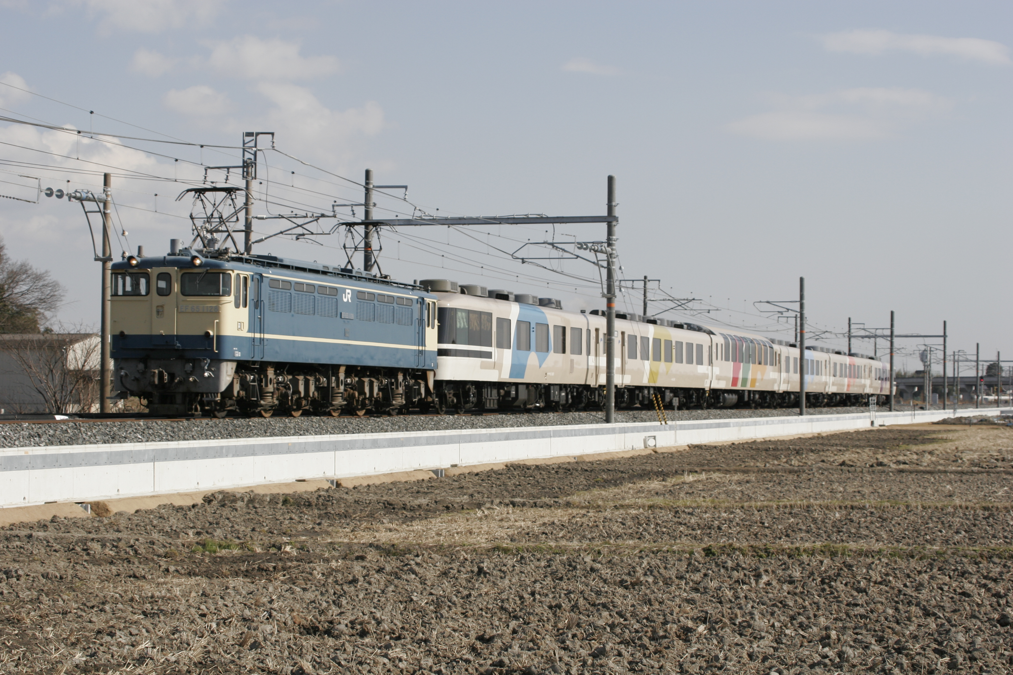 「あすか」による団体臨時列車 備中箕島-早島で撮影